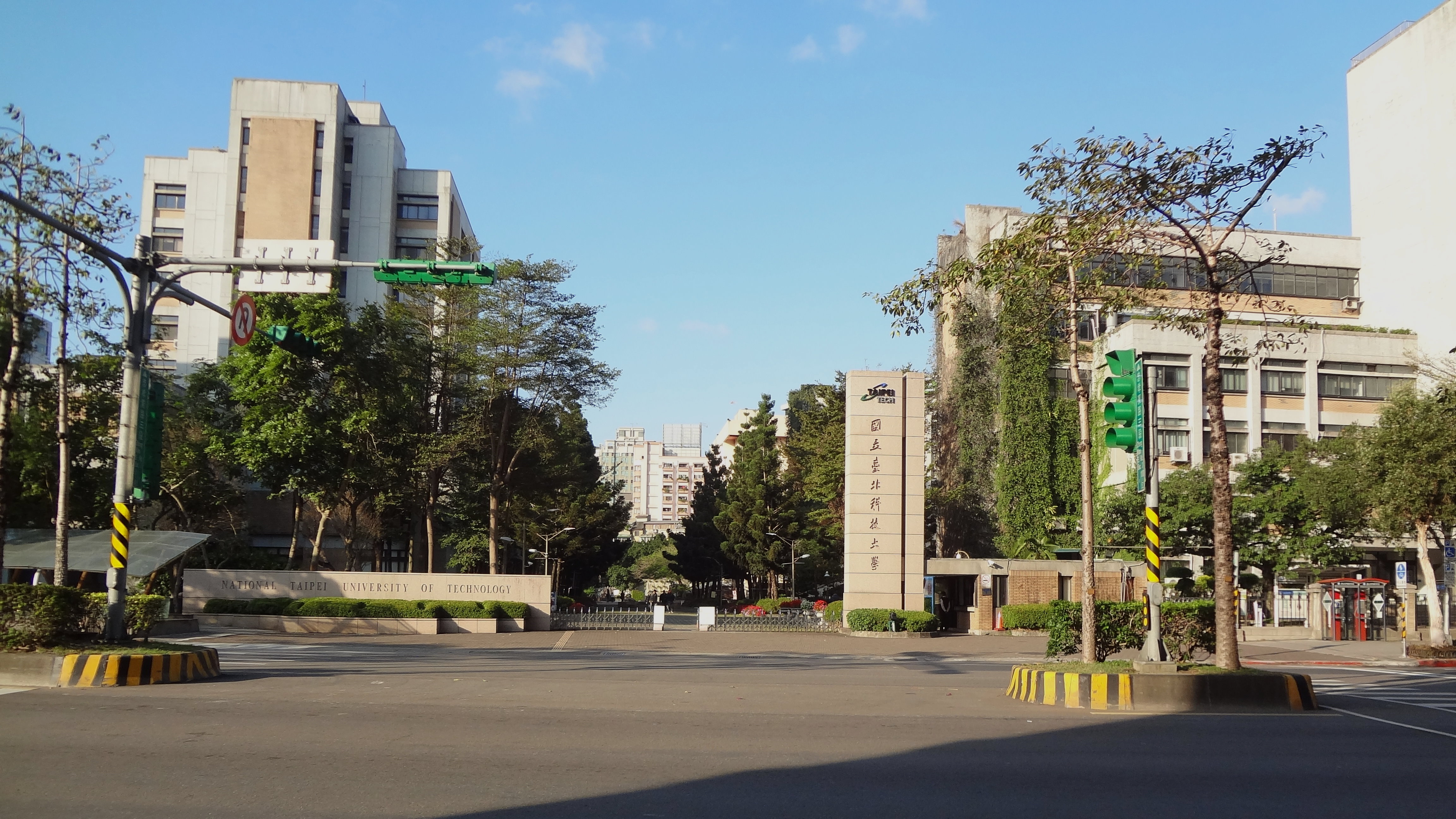 中文（台灣）: 國立臺北科技大學大門，位於臺北市大安區忠孝東路三段1號。